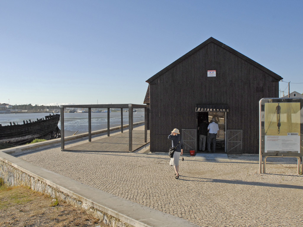 Seixal est une ville de 31.000 habitants située dans le district de Setubal, sur les bords du Tage, à 20 Km de Lisbonne. L'écomusée de Seixal étudie et valorise le patrimoine maritime et industriel de la région à travers l'aménagement de sites et d'espaces d'interprétation. Son siège se trouve dans les locaux de l'ancienne usine de liège Mundet.